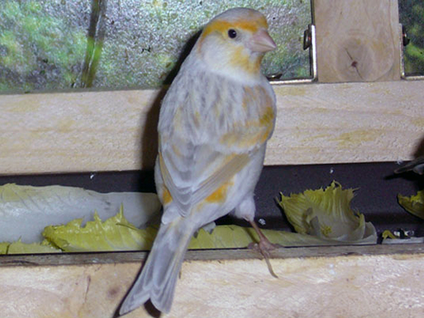 Farbenkanarienhenne in Achat - Opal